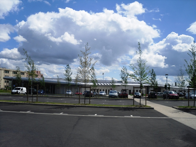 Le centre aquatique d'Athis-Mons (91)